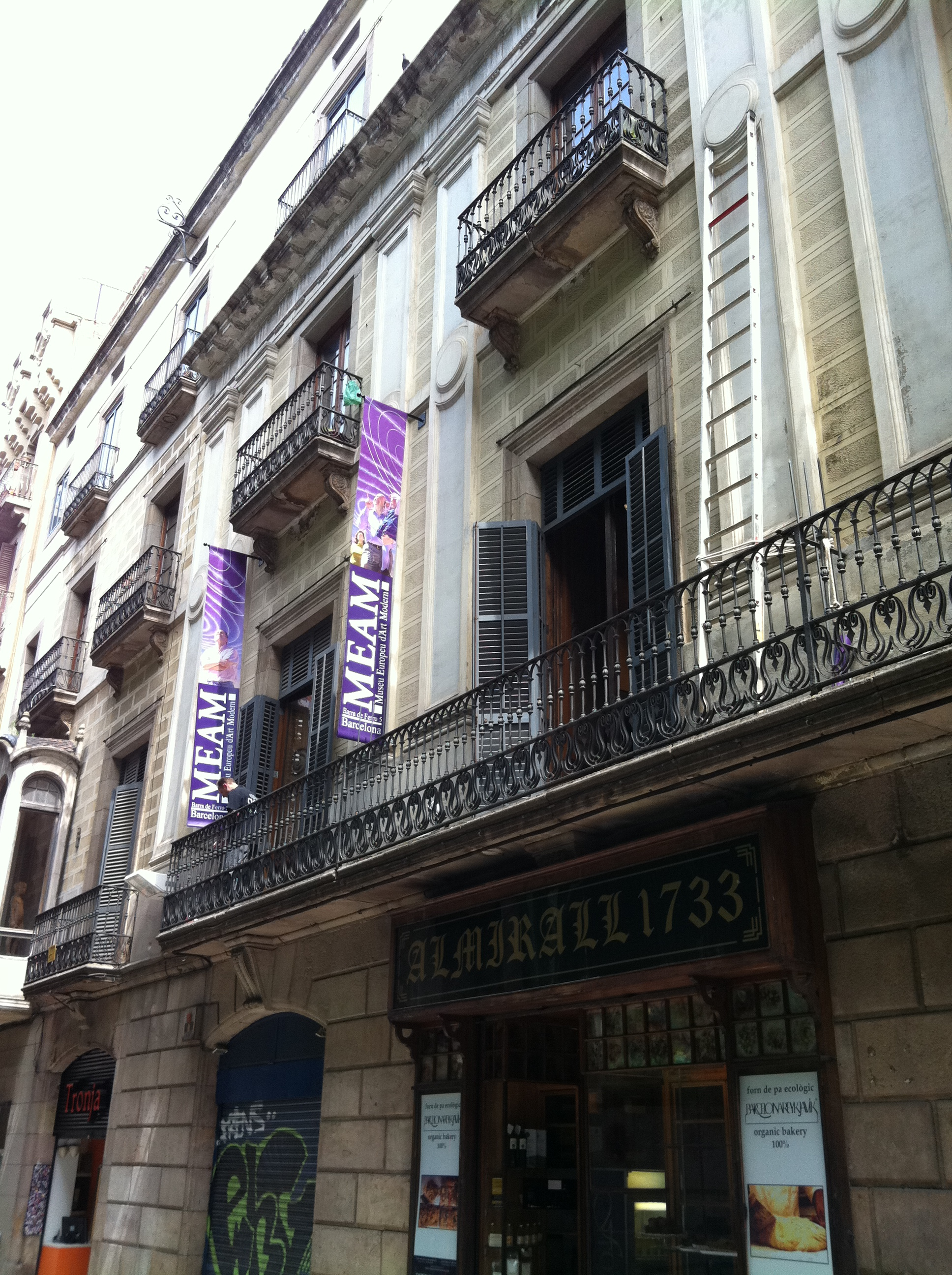 Museu Europeu d'Art Modern